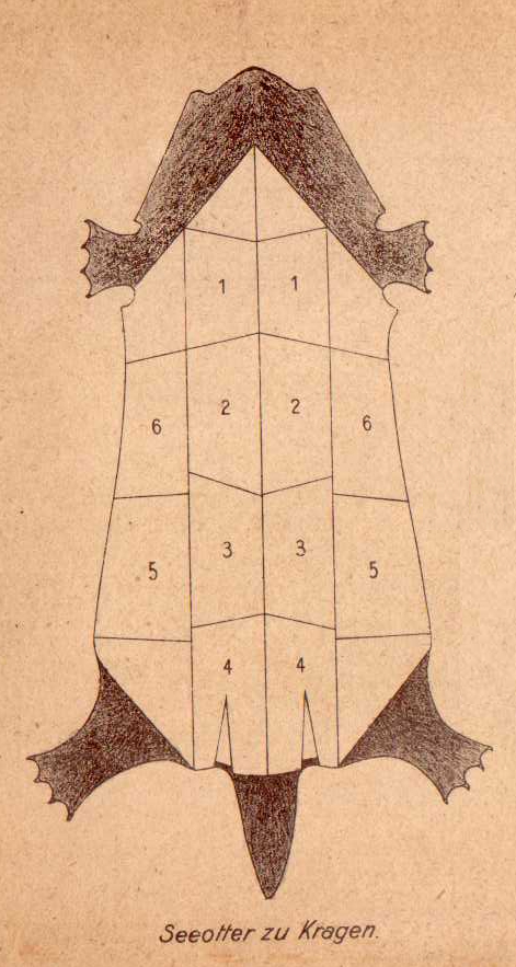 Graphics for Furriers Seeotter zu Kragen (Seitenausschnitt)